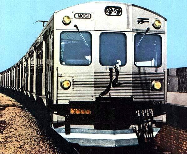 Foto publicitária da RFFSA realizada para compor o anúncio público da chegada dos novos trens para a Linha Tronco Mogi dos subúrbios da empresa.